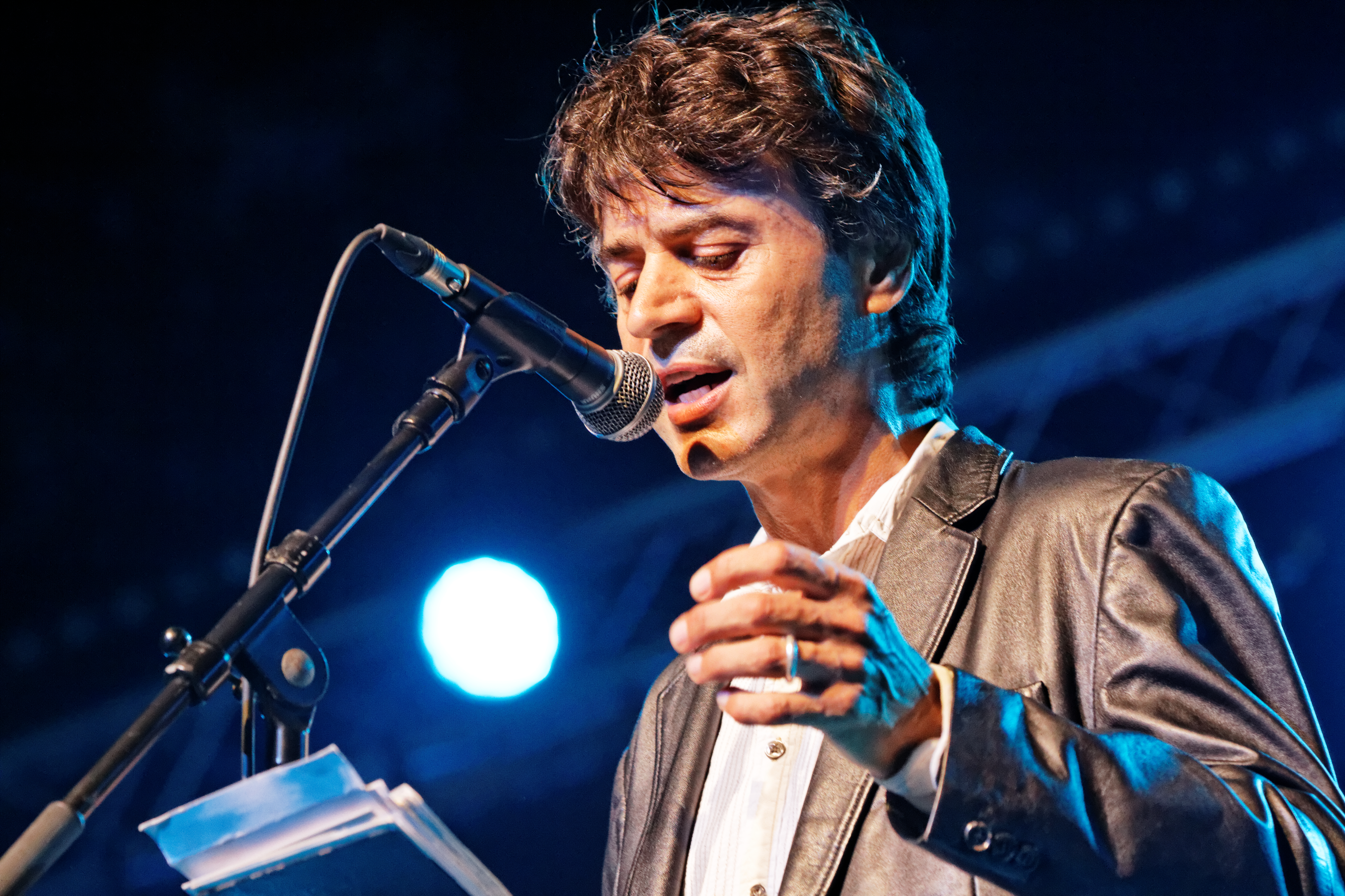 Denez Prigent en concert sur la scène Gradlon lors du festival de Cornouaille 2014.